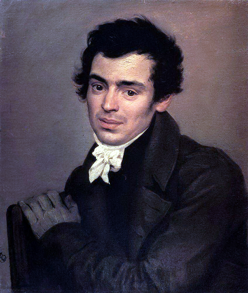 Arkhitektor Konstantin Thon